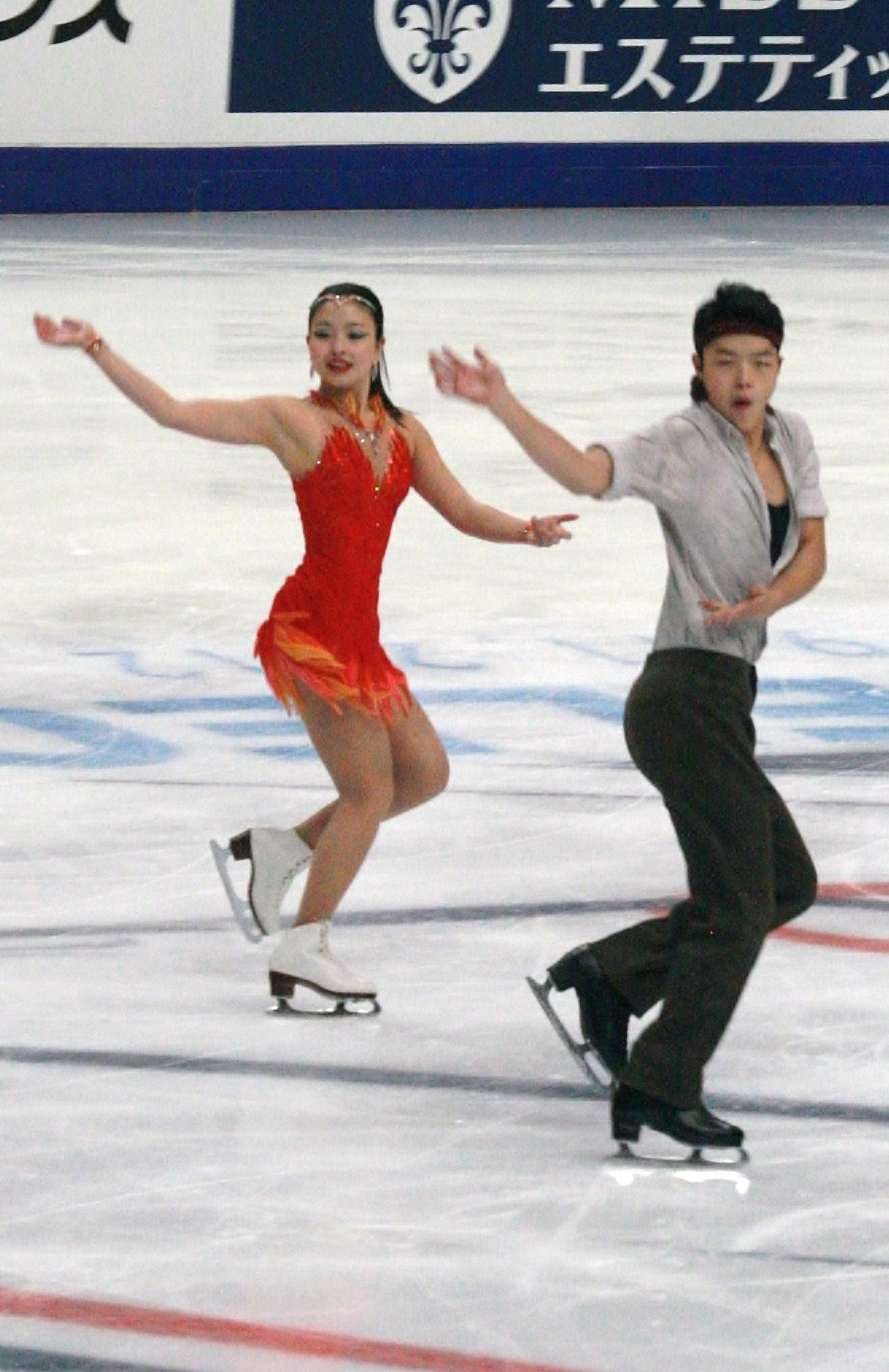 Майя Шибутани и Алекс Шибутани (США) на Кубке Ростелекома 2012. Короткий танец.